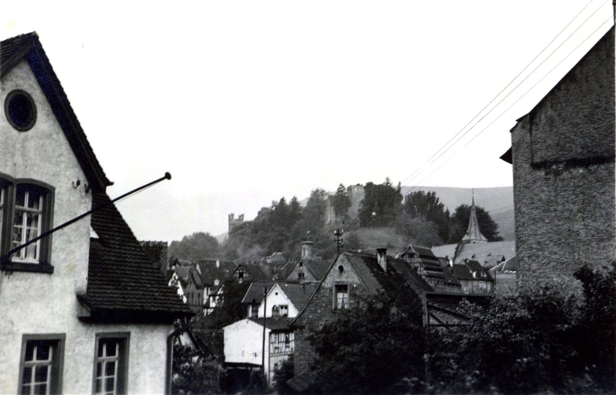 Neckarsteinach im Juli oder August 1939